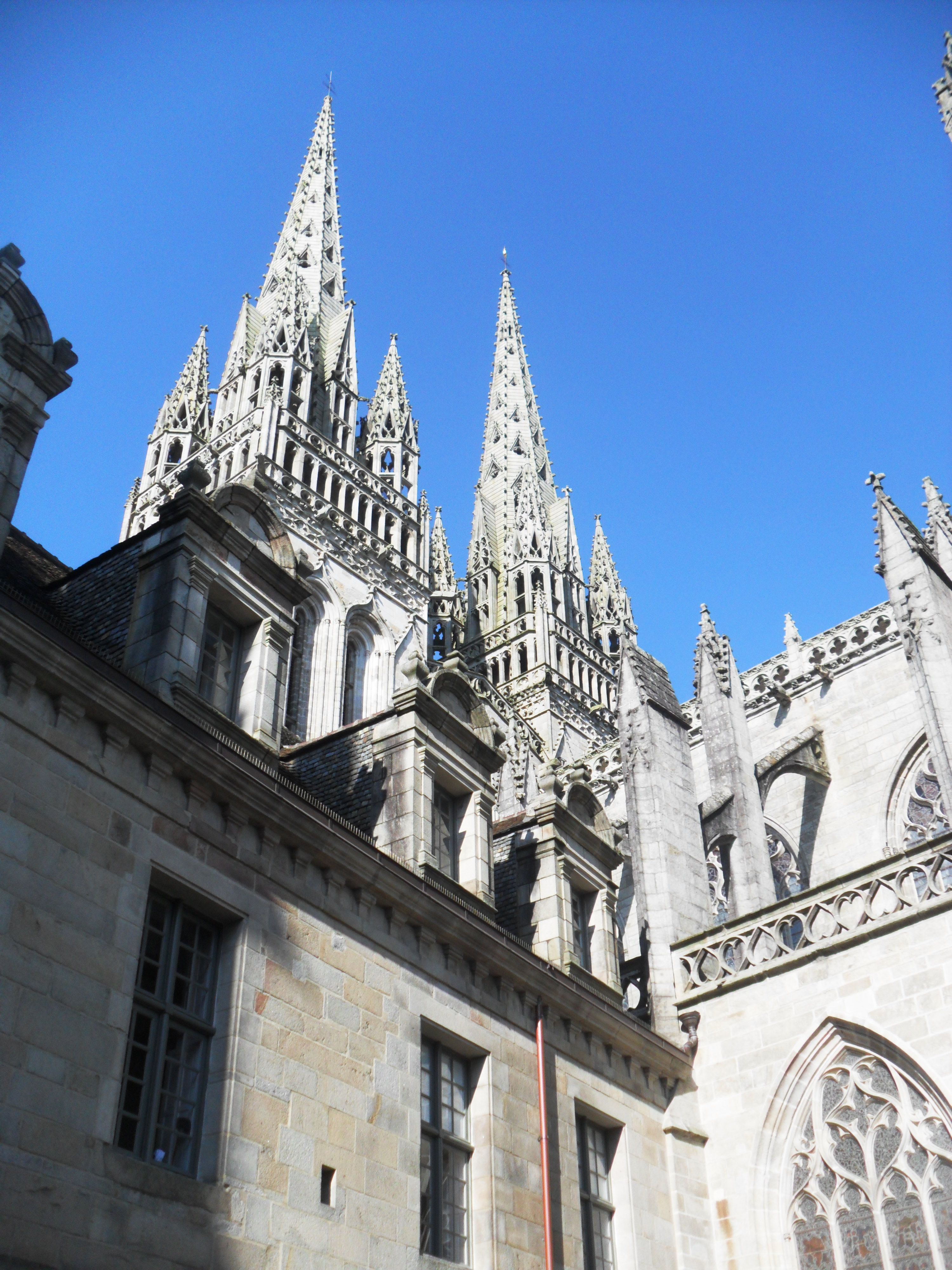 Vue extérieure: la Cathédrale de Saint-Corentin en (Février 2013)